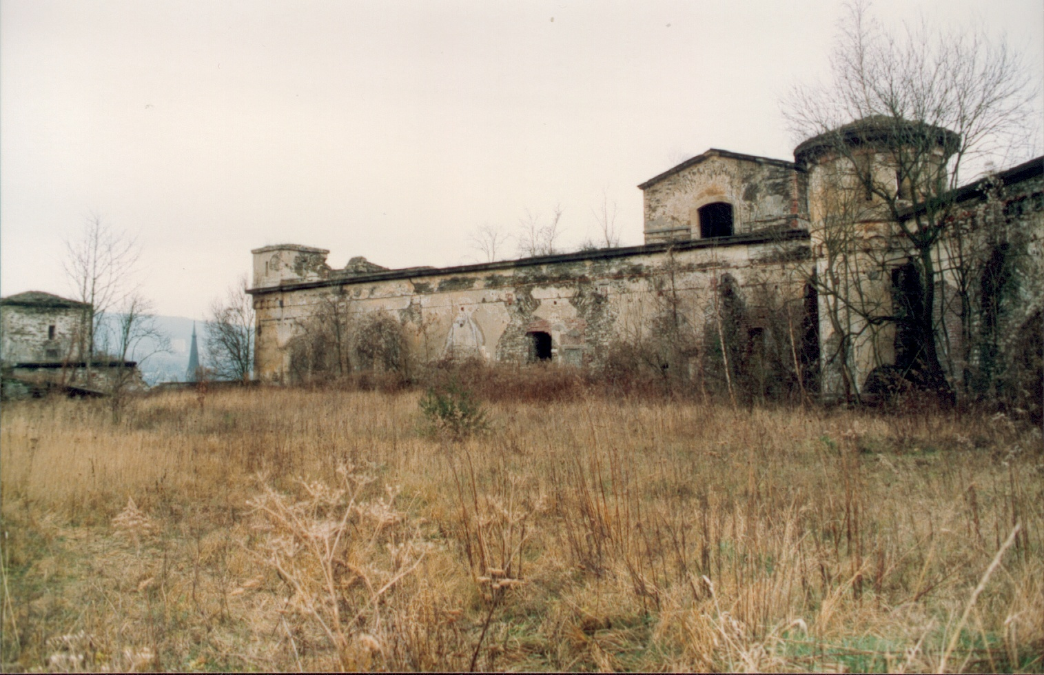 Fort Konstantin in Koblenz, Innenhof, Blick auf den linken Teil des Kasemattenkorps zur Rheinseite hin.